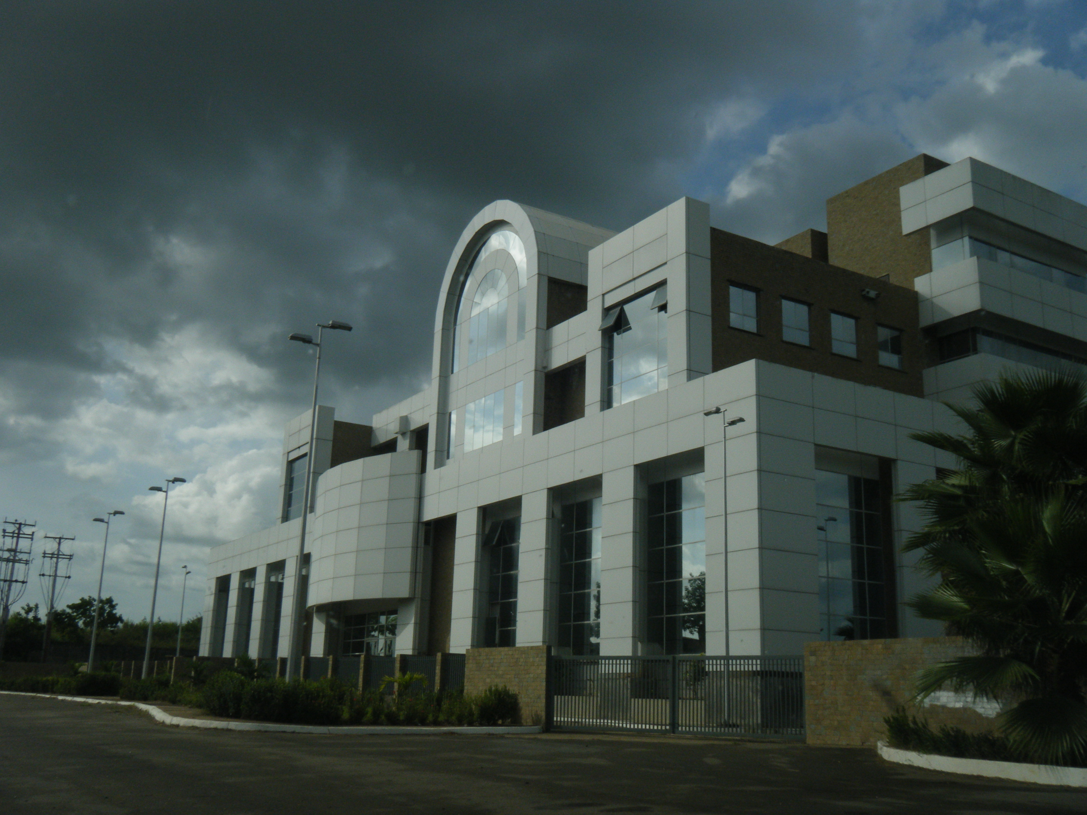 Edificio de justicia (Palacio de Justicia) en Maturin, avenida Alirio Ugarte pelayo, Estado Monagas, Venezuela.